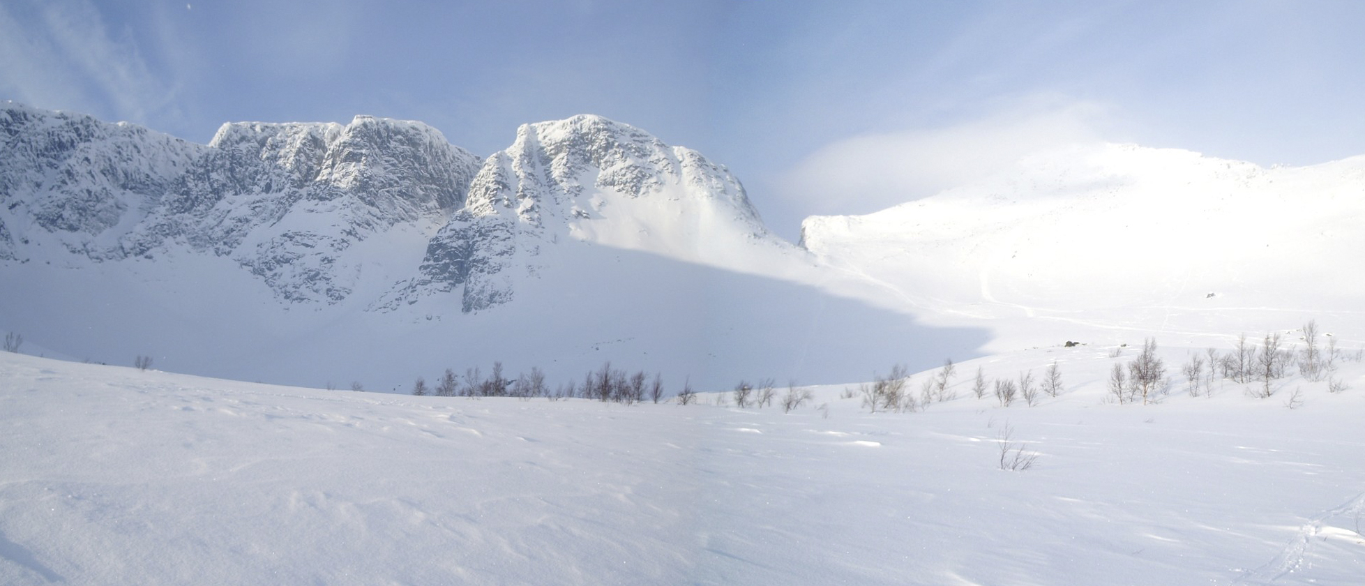 Хибины. Слева направо: горы Большой Вудъяврчорр, Малый Вудъяврчорр, перевал Географов, гора Тахтарвумчорр